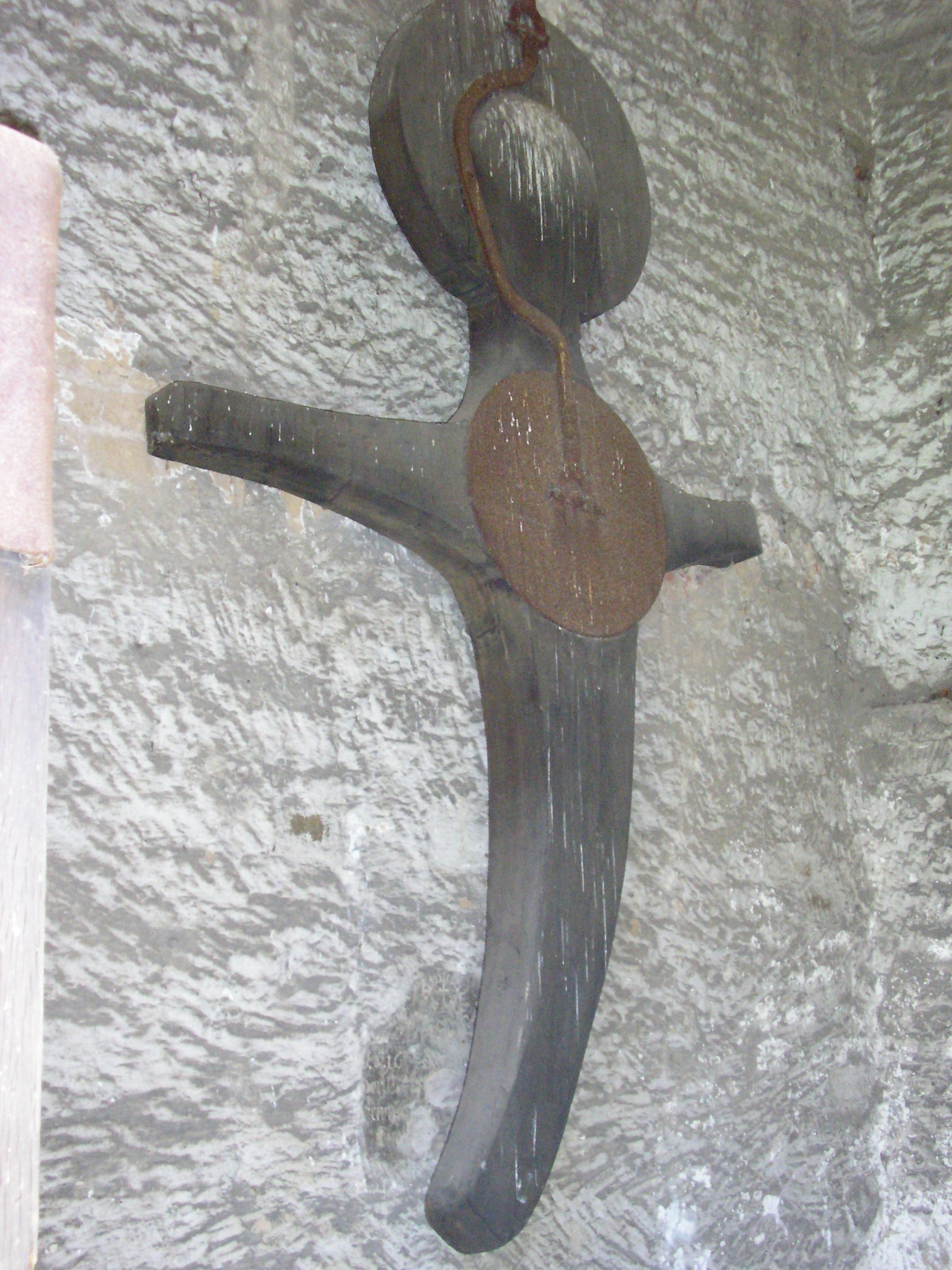 Meerbusch, Rhein-Kreis Neuss, Corpus von Joseph Beuys